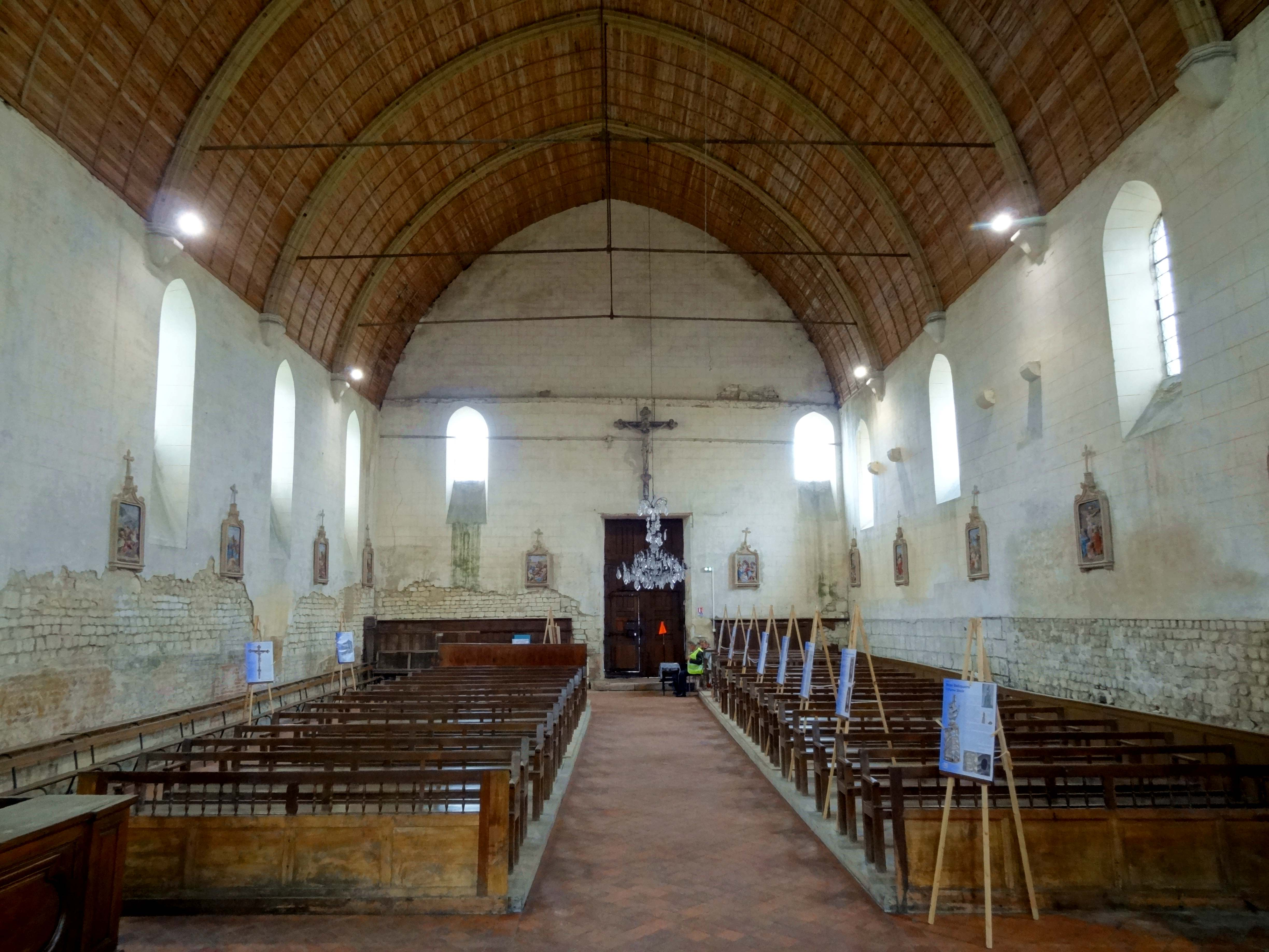 Intérieur de l'église - voir titre.